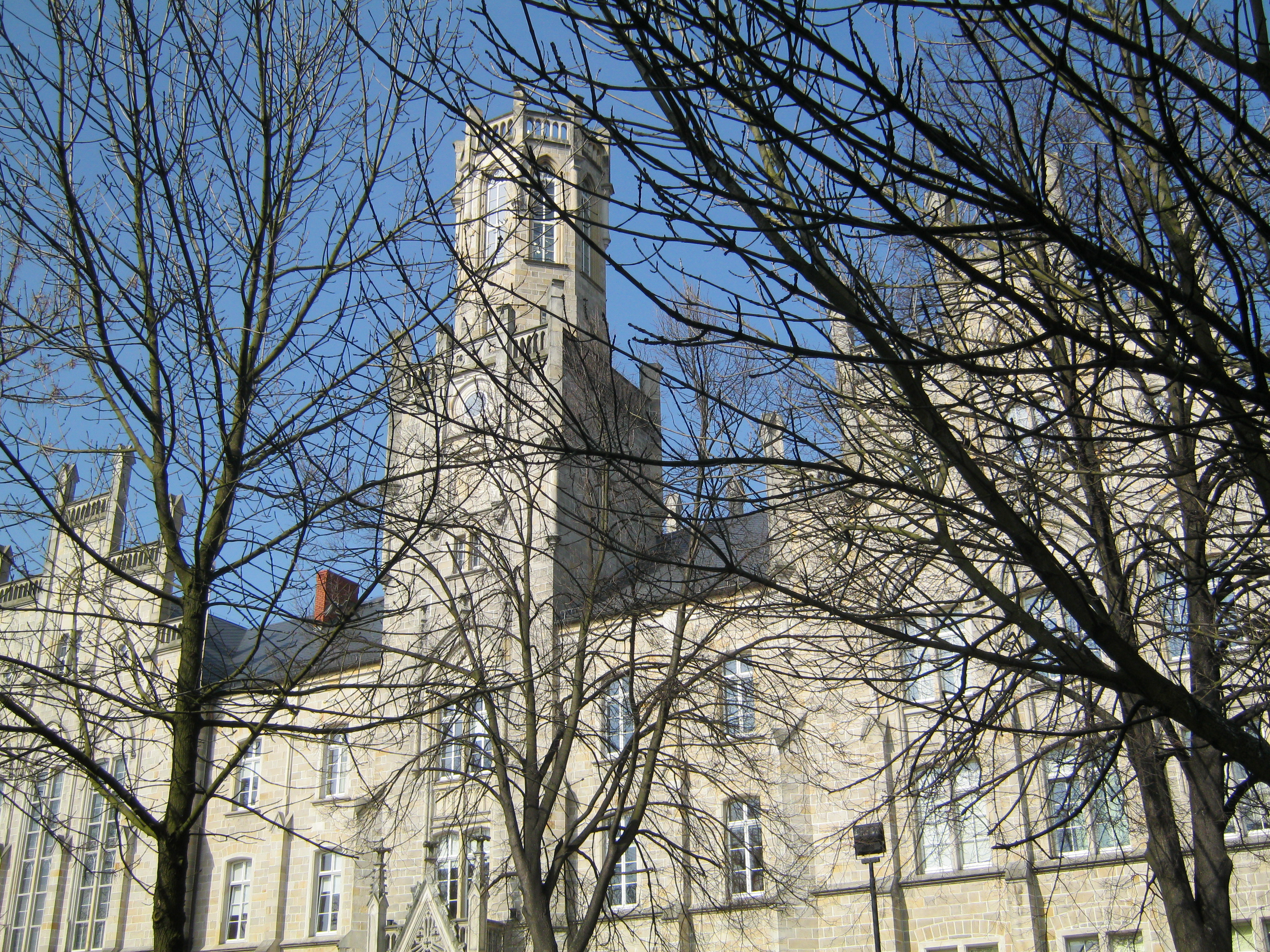 Sąd Rejonowy w Bolesławcu.